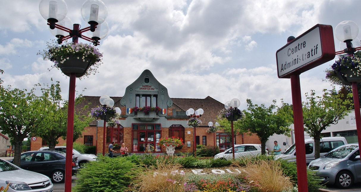 La Mairie